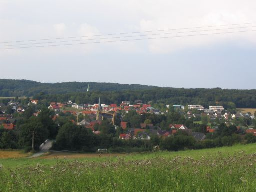 Bissendorf, Landkreis Osnabrueck, Niedersachsen, Germany